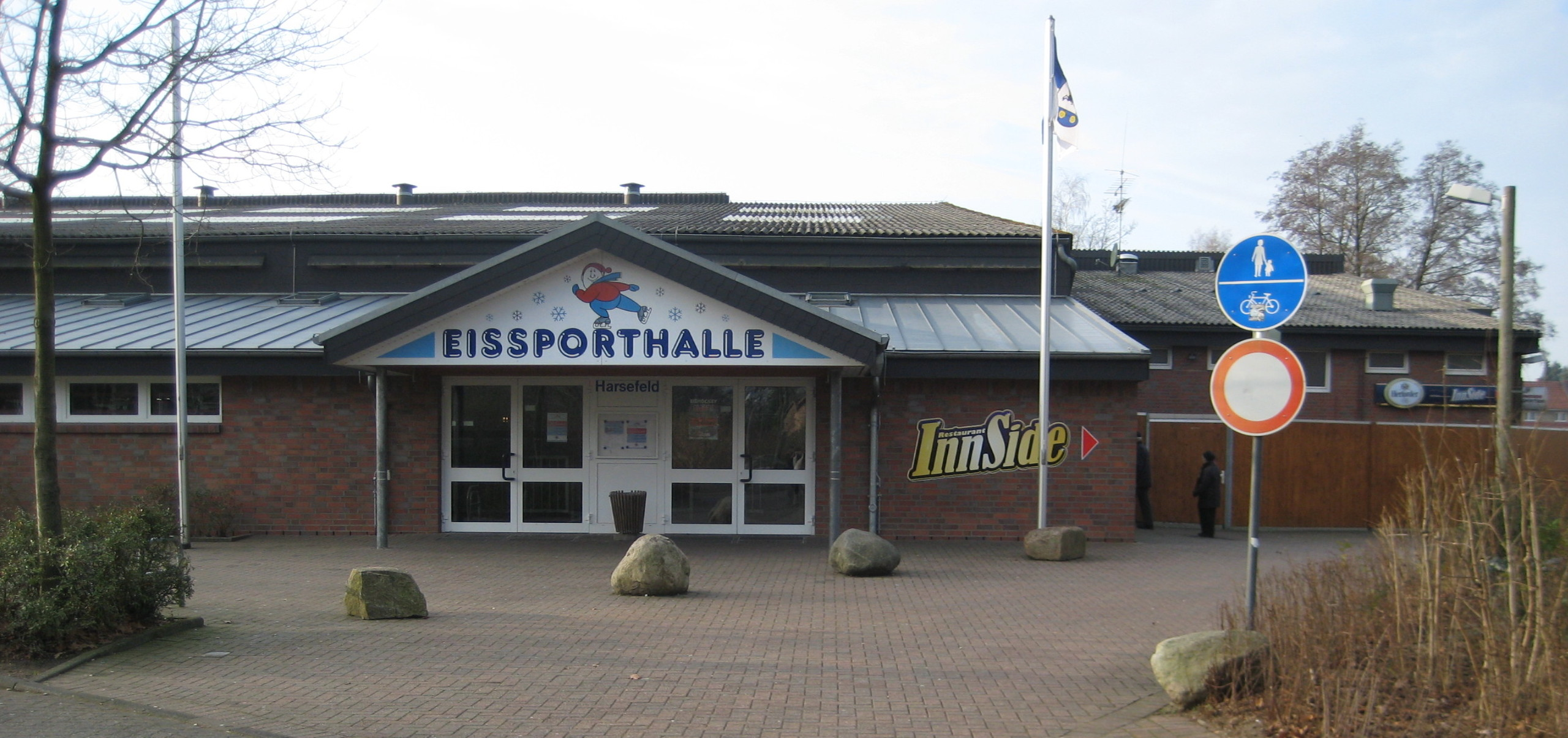 Eissporthalle in Harsefeld,Landkreis Stade, Niedersachsen, Deutschland